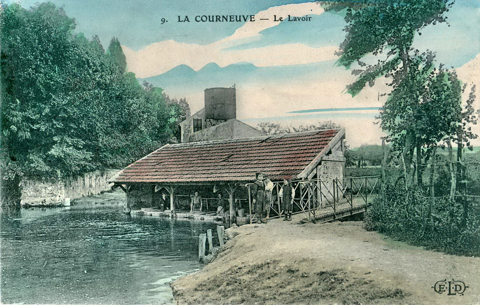 Carte postale ancienne éditée par ELD, N° 9LA COURNEUVE - Le Lavoir (sur la rivière Croult)